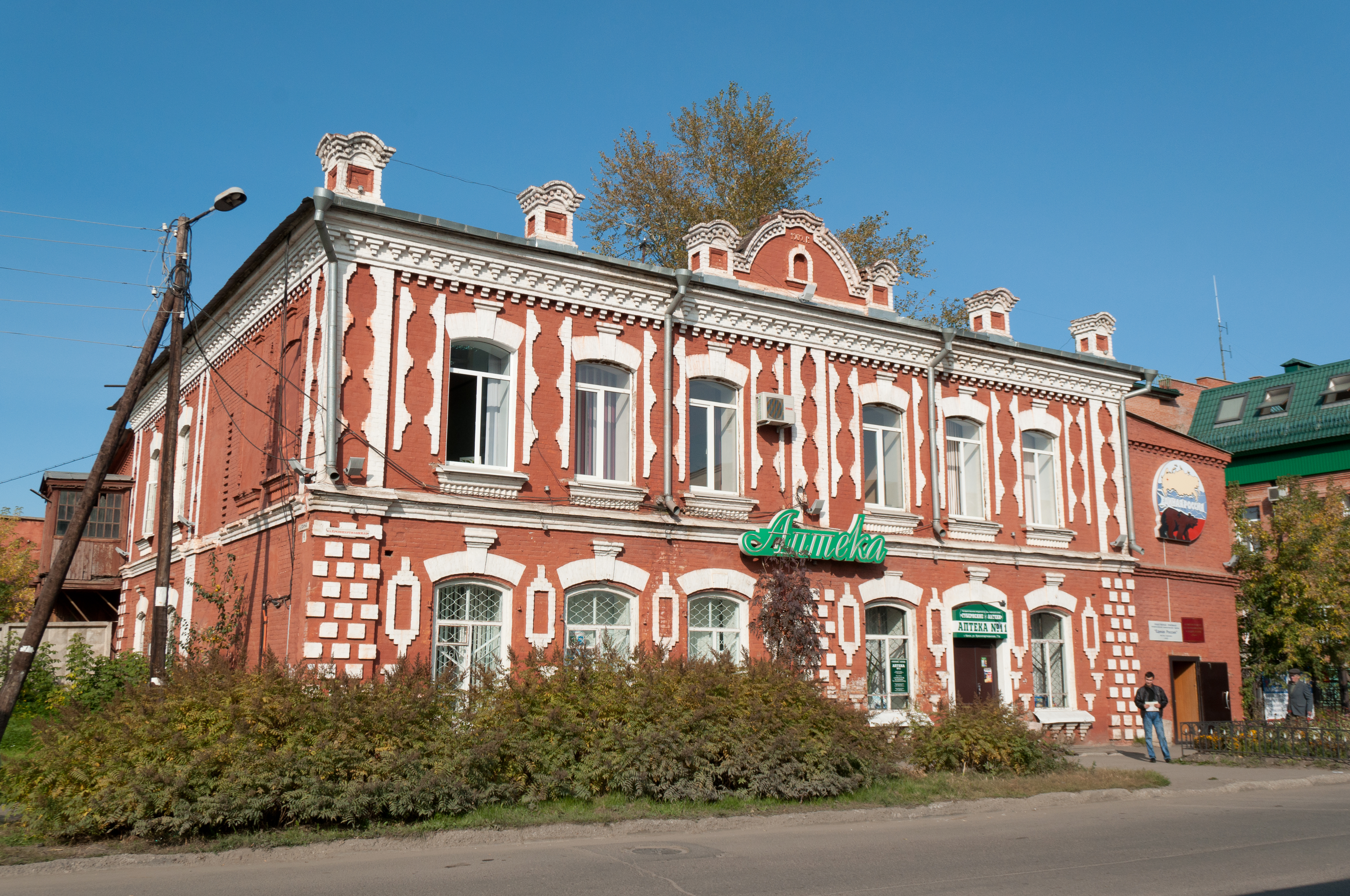 Описание с naov.ru: "Памятник архитектуры в городе Канске — торговое здание начала XX века. Датировка памятника архитектуры произведена на основании даты, помещенной на фронтоне главного фасада дома — 1909 год. По данным БТИ г.Канска, дом построен в 1912 г.; возможно, это датировка относится ко времени возведения пристроек со стороны заднего фасада".